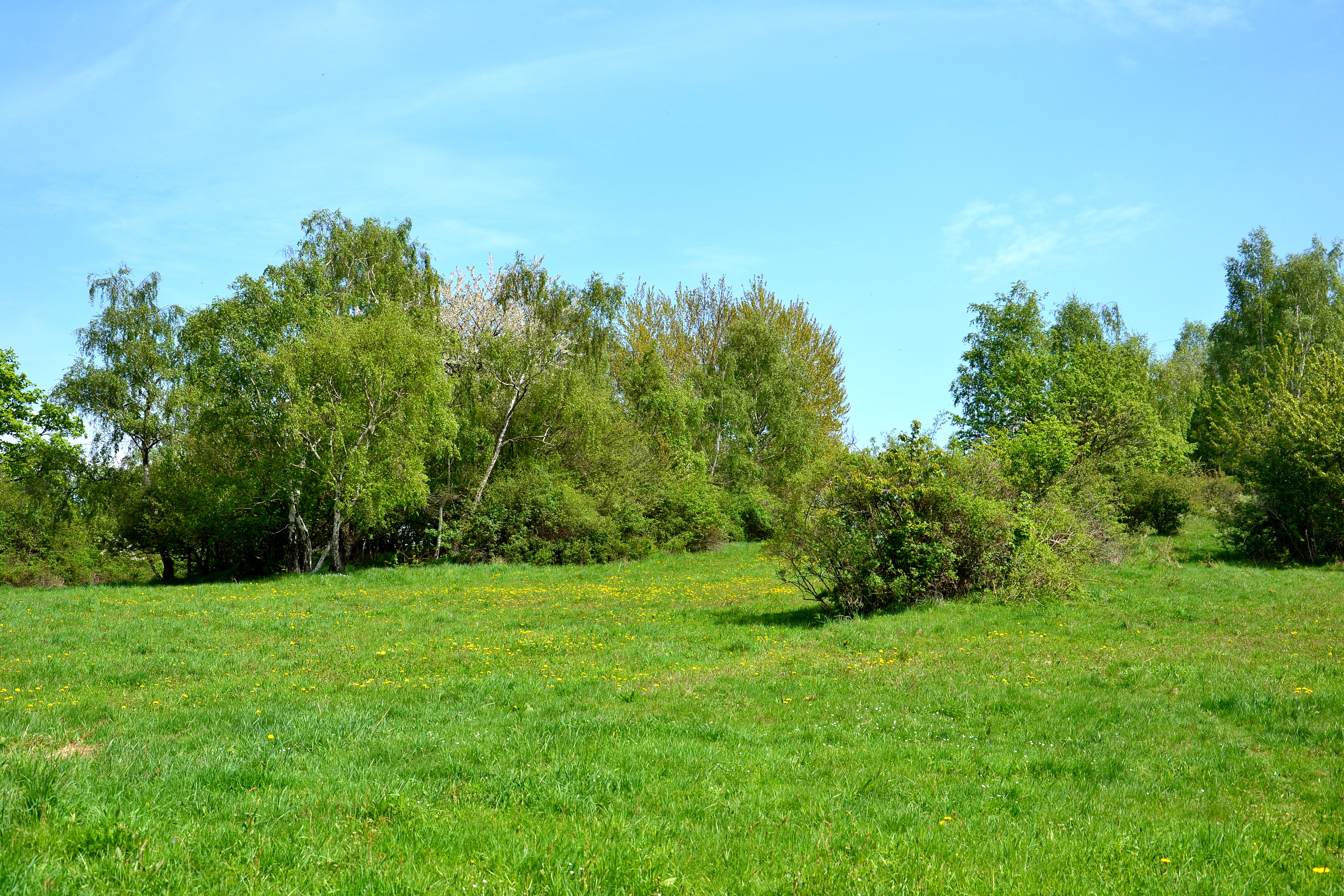 PP Podmilesy - západní cíp chráněného území